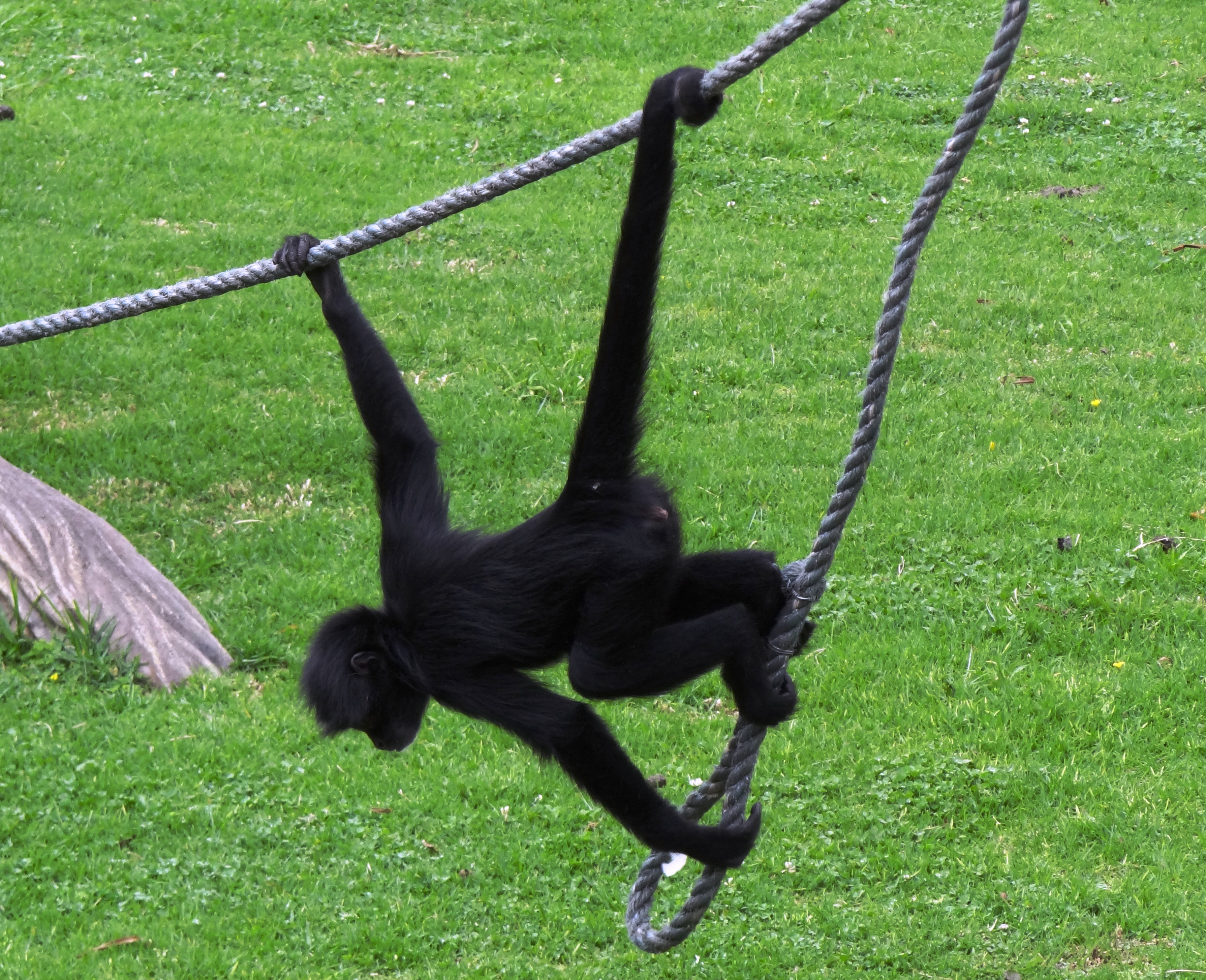 Ejemplar juvenil de mono araña de brazos largos en el zoológico del Parque Jaime Duque, Cundinamarca, Colombia. Locomoción usando su cola como quinto miembro